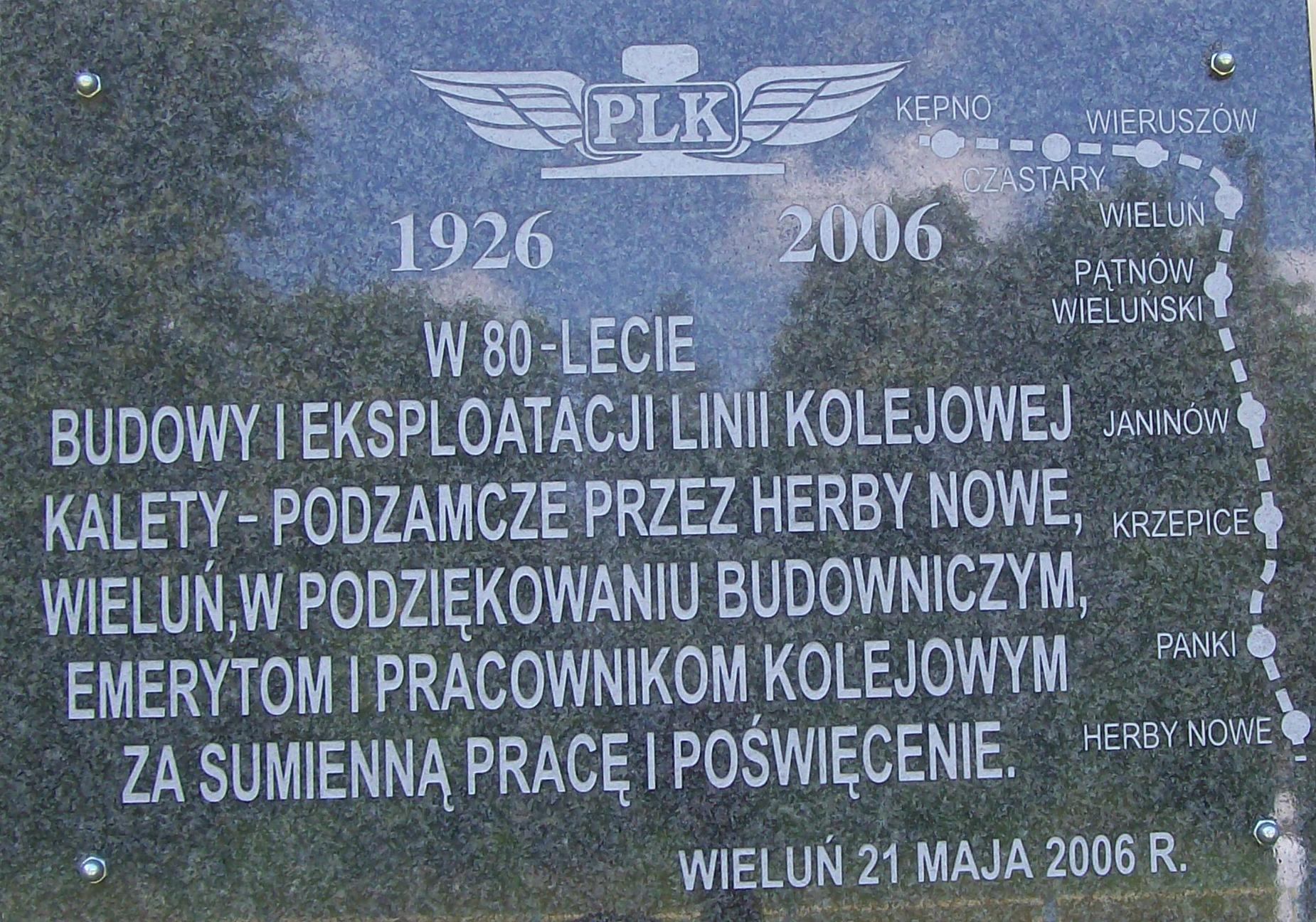 Tablica pamiątkowa na stacji kolejowej Wieluń Dąbrowa – tablica wmurowana z okazji 80 lecia eksploatacji linii.